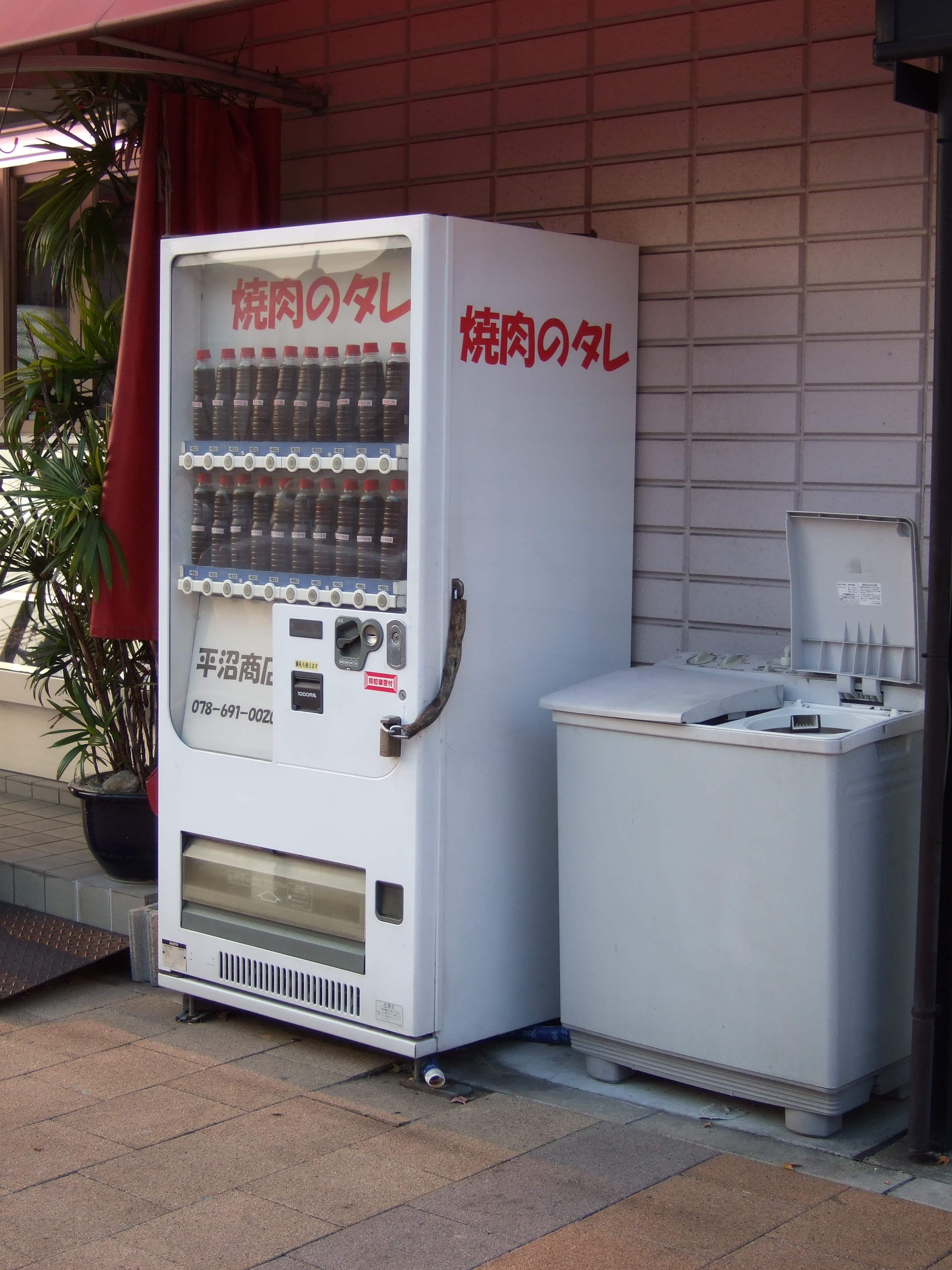 神戸市長田区にある自動販売機